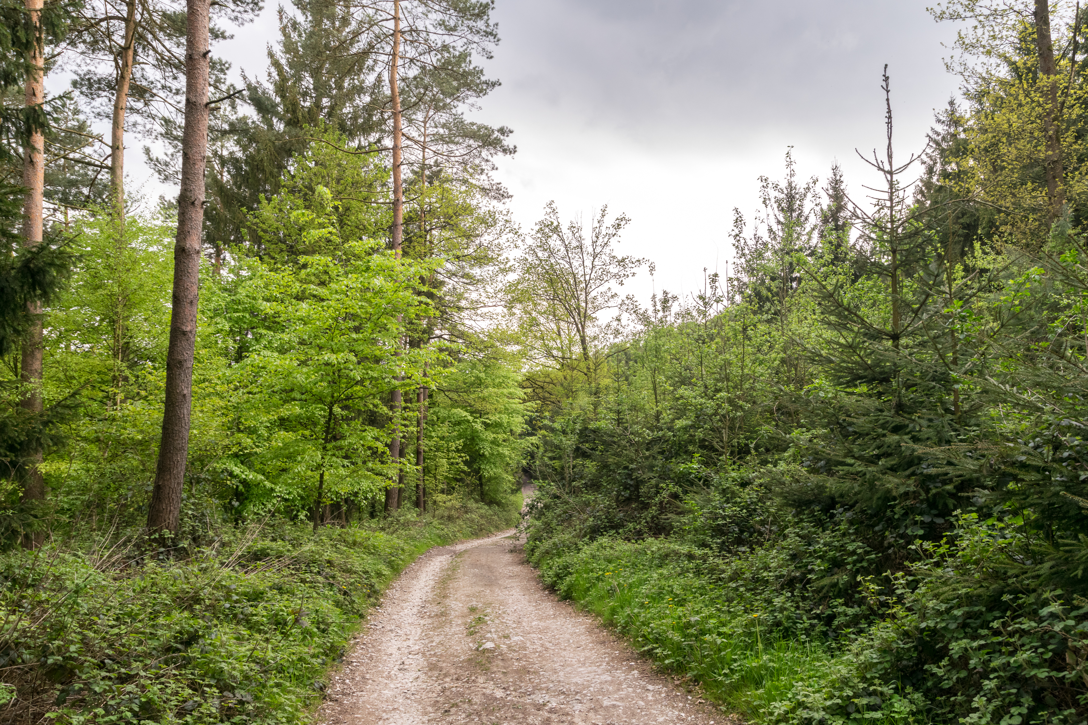 Naturschutzgebiete Östlicher Teutoburger Wald (LP BI-Senne) (rechts) und Menkhauser Bachtal (BI) (links)